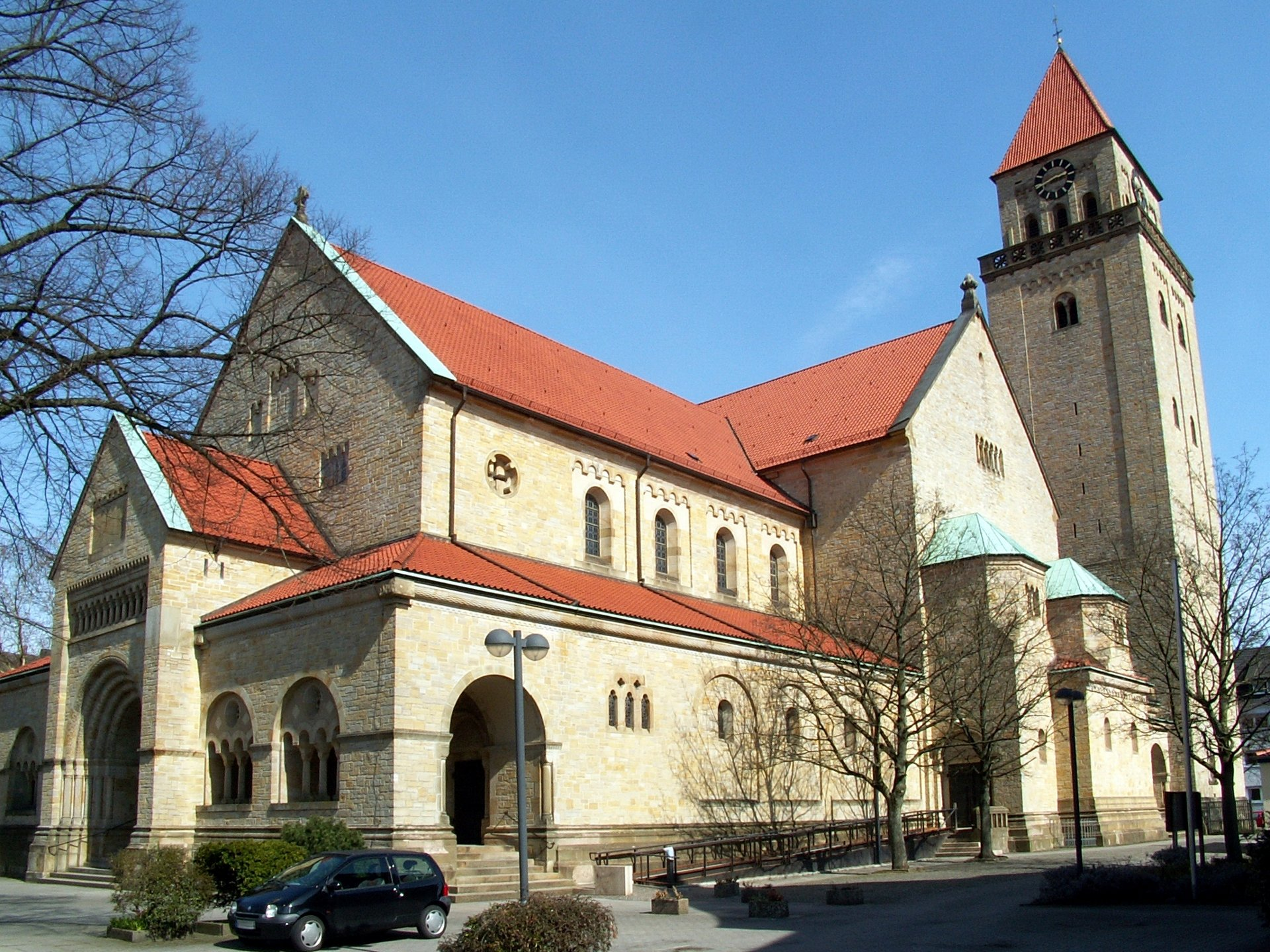 kath. Kirche St. Joseph in Osnabrück, Stadtteil Schölerberg, Ansicht von Südwesten